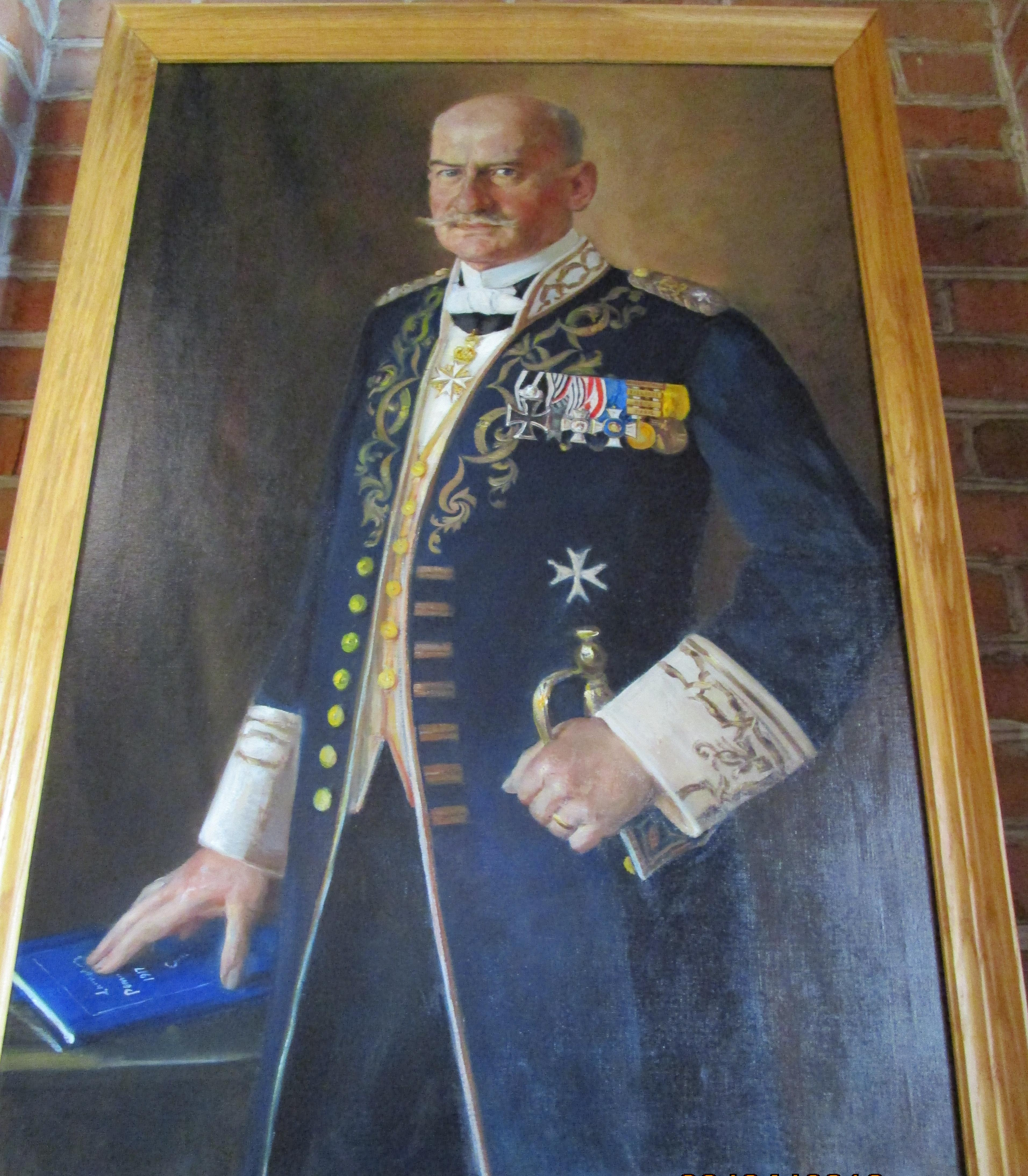 Georg von Eisenhardt-Rothe als Generallandschaftsdirektor 1918-1931 - Gemälde im Museum Stettin